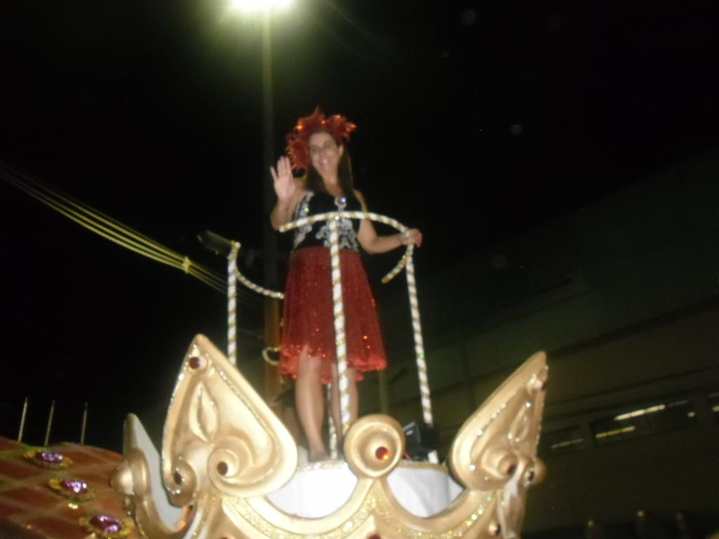 Arrastão, 2012. Na foto, a presidente do Flamengo, Patrícia Amorim, homenageada.